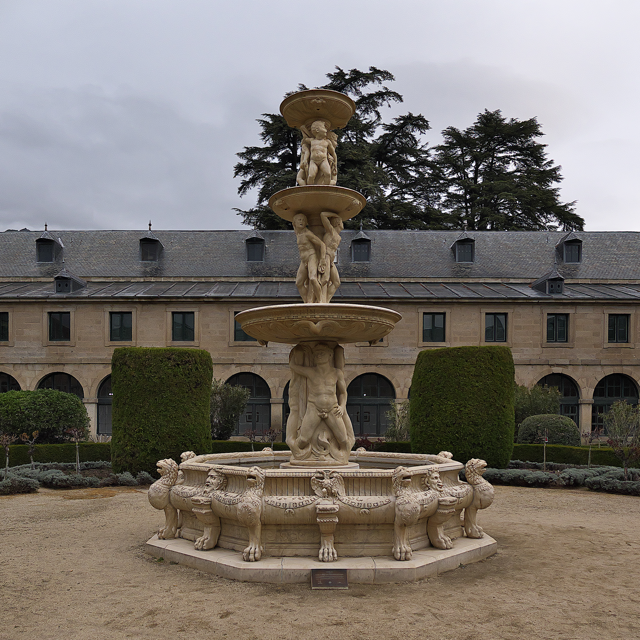 María Cristina de Hasburgo-Lorena traslada la Fuente del Águila, desde la Casa de Campo de Madrid a la Casa de la Compaña (1890)